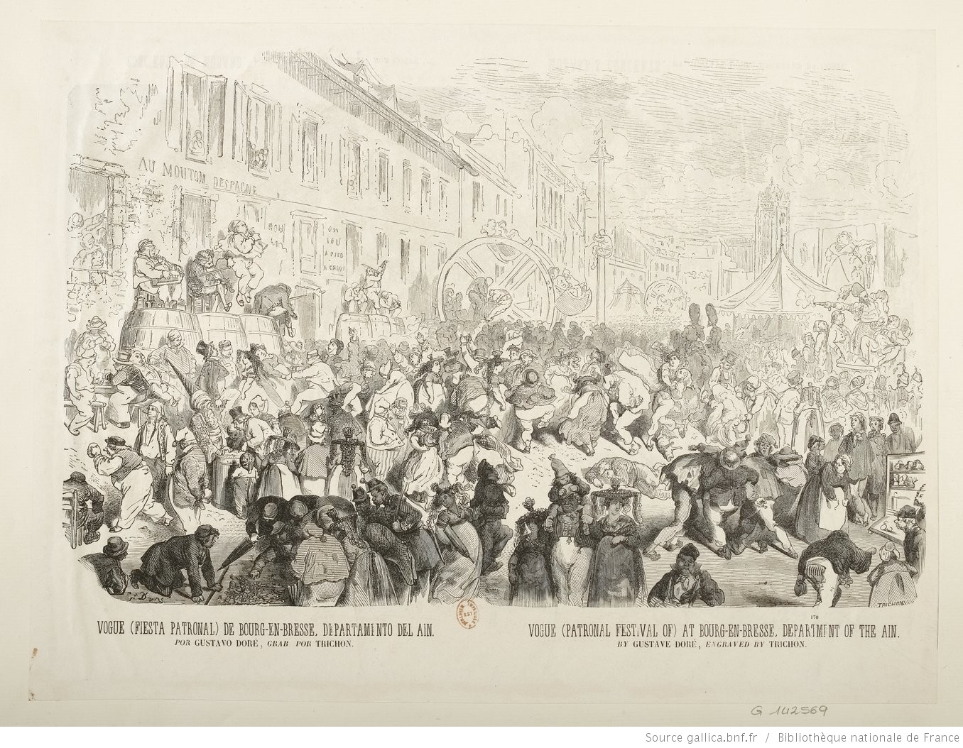 La vogue de Bourg-en-Bresse (Ain, France), vue par Gustave Doré